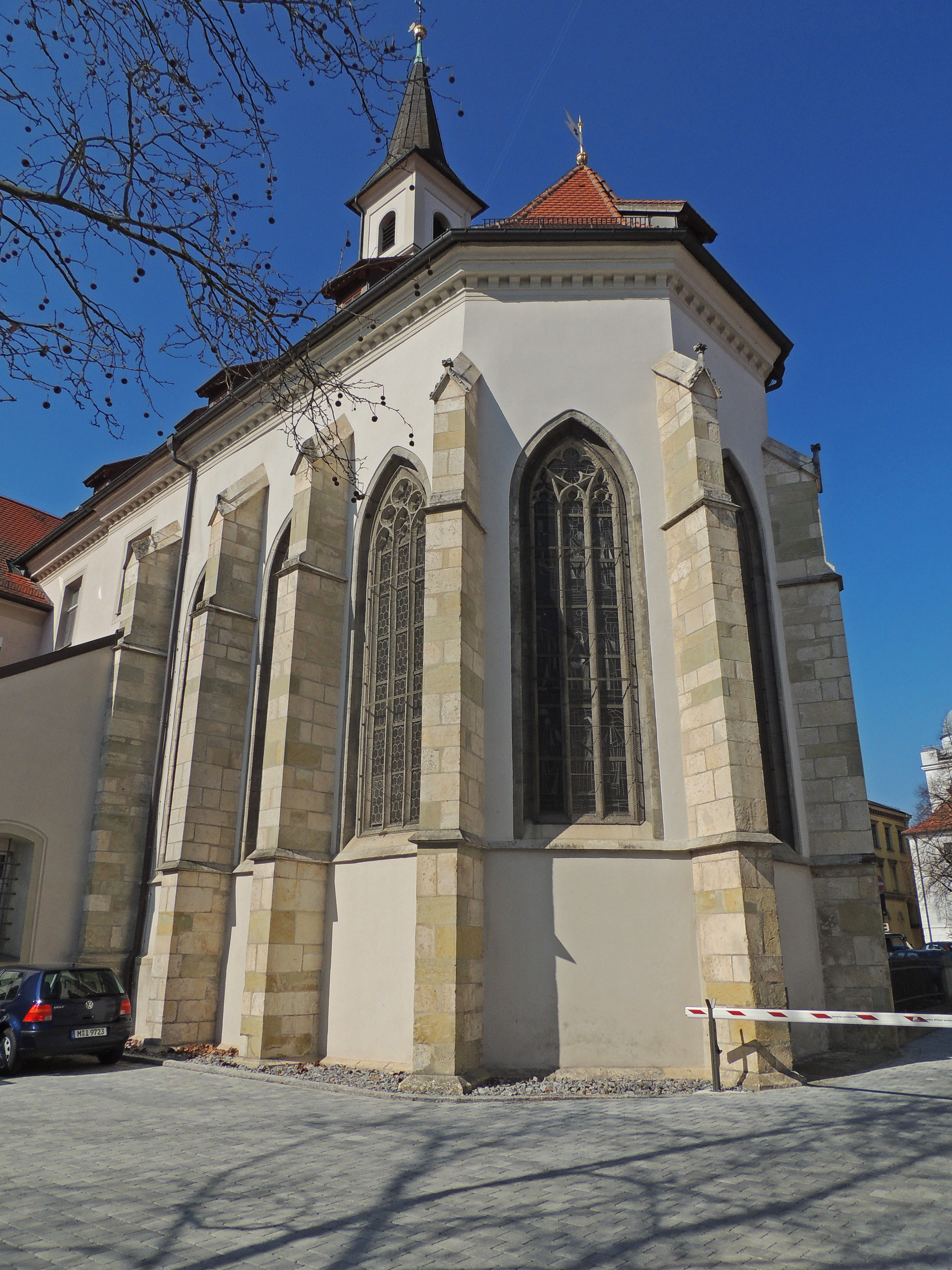 Die Kirche St. Ägidius ist eine ehemalige Deutschordenskirche aus dem Jahr 1270/80. Die Seitenschiffe wurden im späten 14. Jahrhundert erbaut, der Chor vor 1396. D-3-62-000-17This is a photograph of an architectural monument.